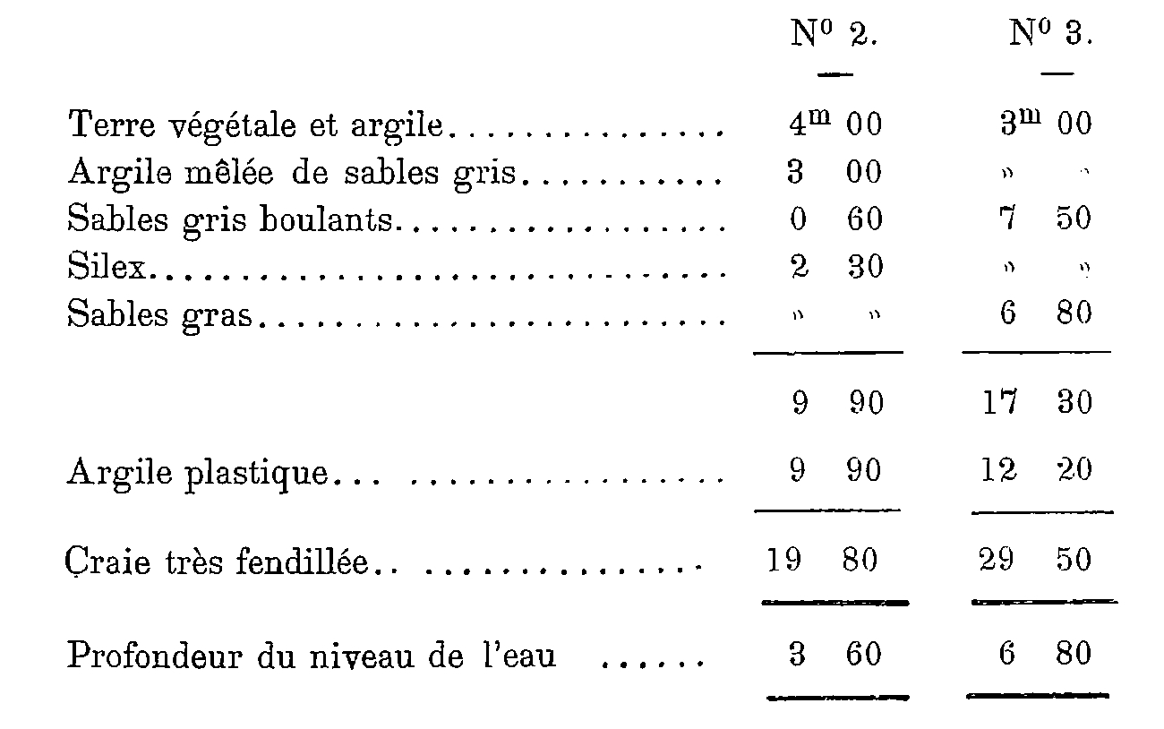 Terrains recoupés lors du fonçage des puits n° 2 et 3 de la Compagnie des mines de Vendin.